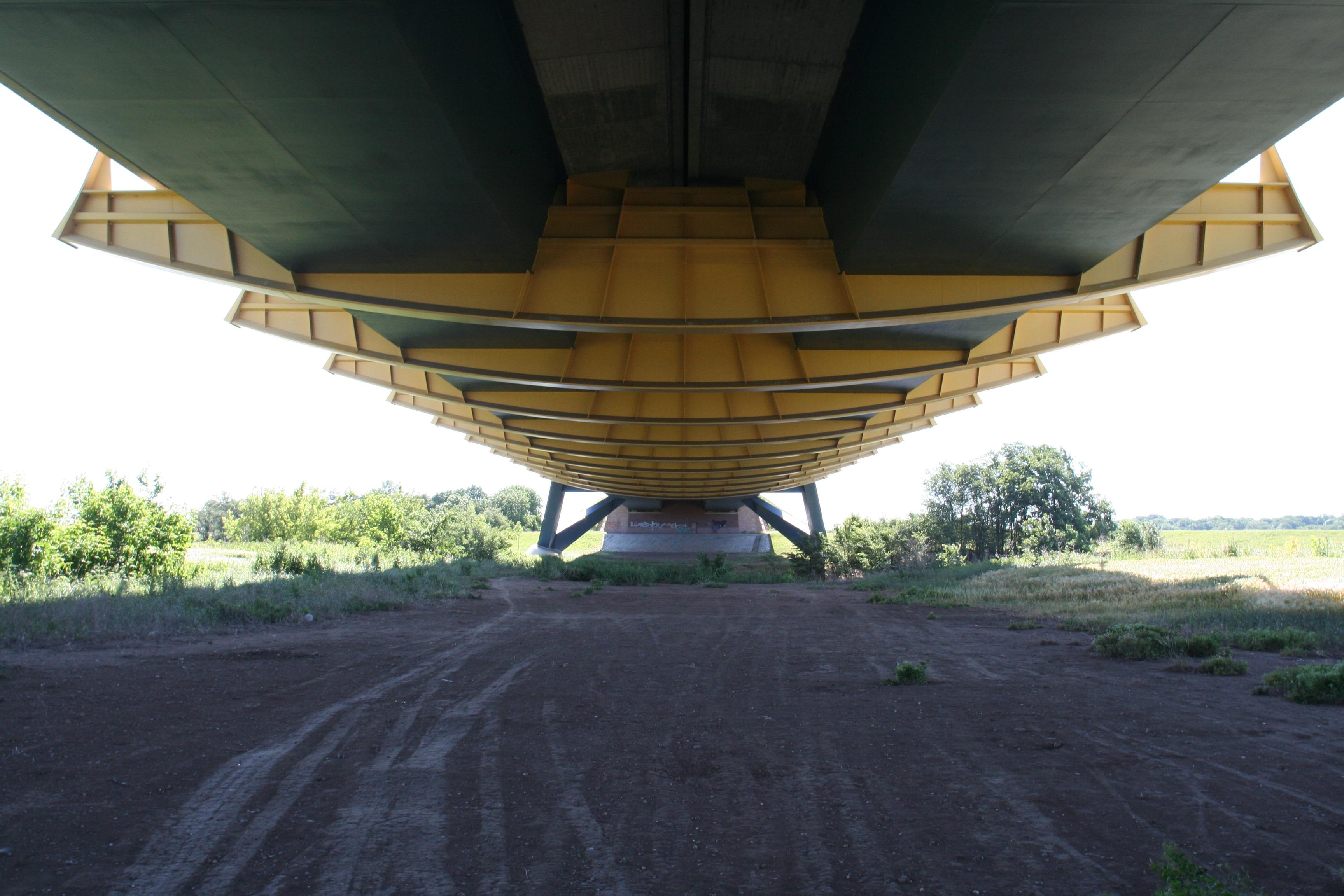 Saalebrücke der A14 bei Beesedau, OT Könnern in Sachsen-Anhalt